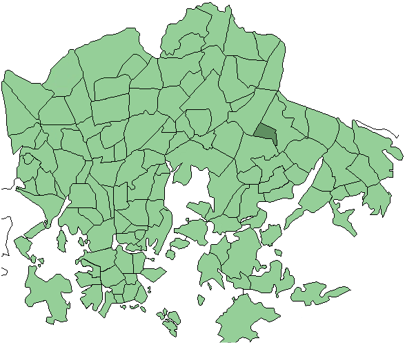 Districts of Helsinki, Kurkimäki district highlighted (in Finnish: Kurkimäen peruspiiri korostettuna)